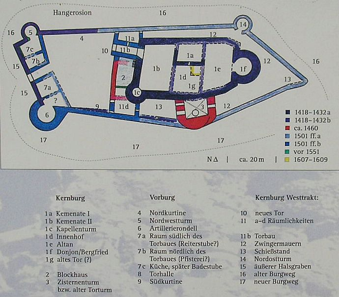 Burg Hohenfreyberg bei Pfronten (Allgäu). Grundriss und Baualtersplan auf der Infotafel am Zugang.